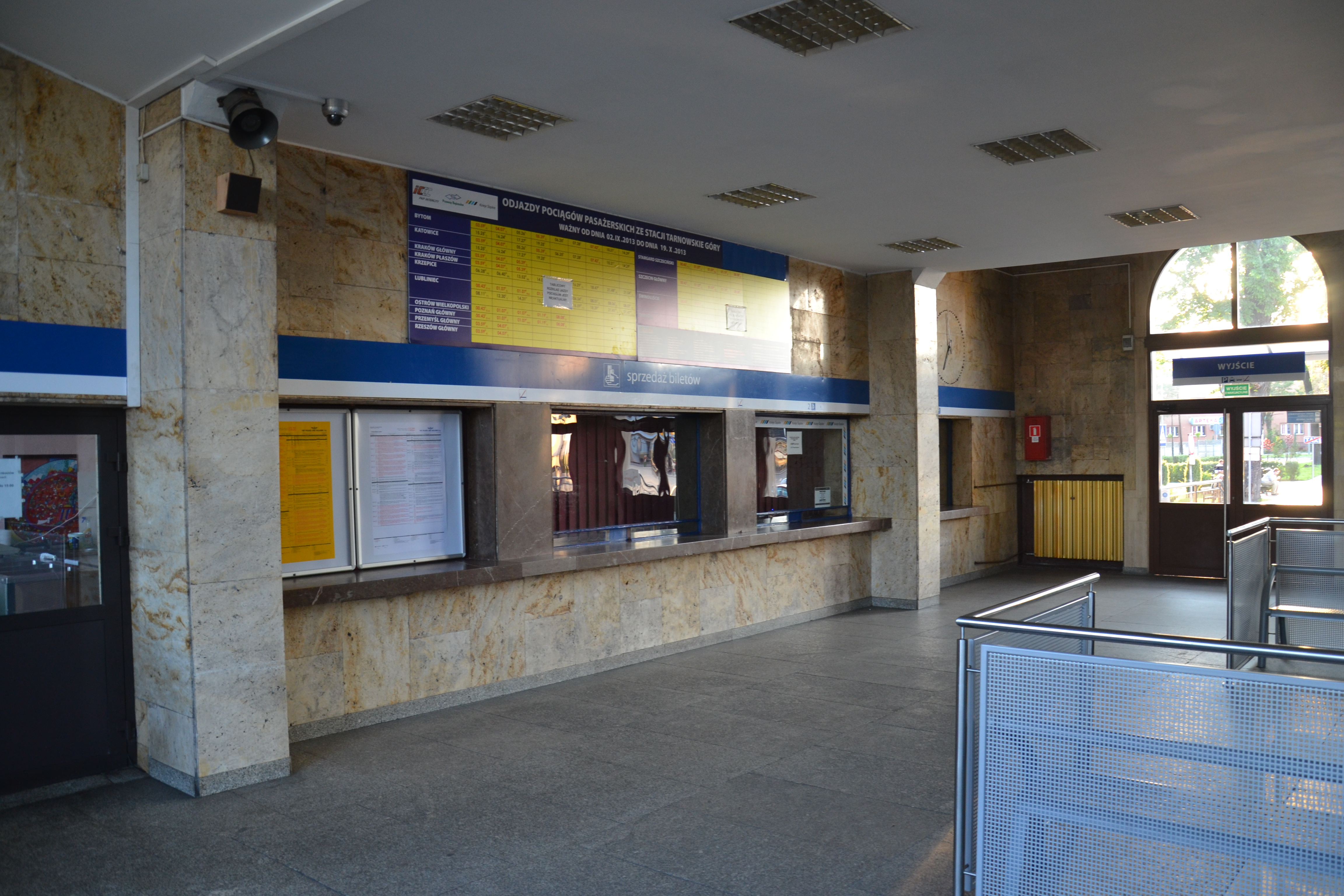 Hall dworca kolejowego w Tarnowskich Górach